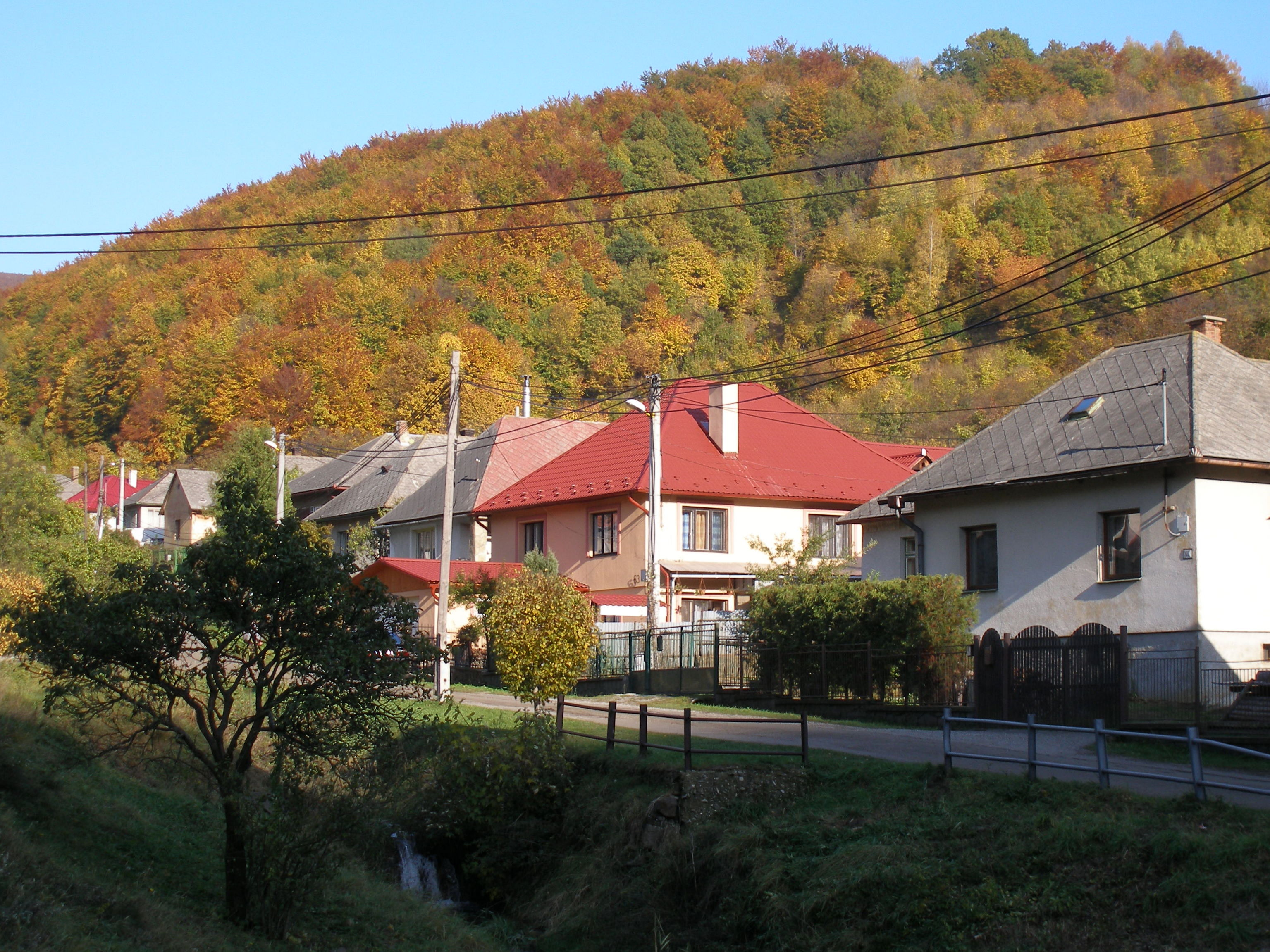 Obec Zlatá Baňa okres Prešov.